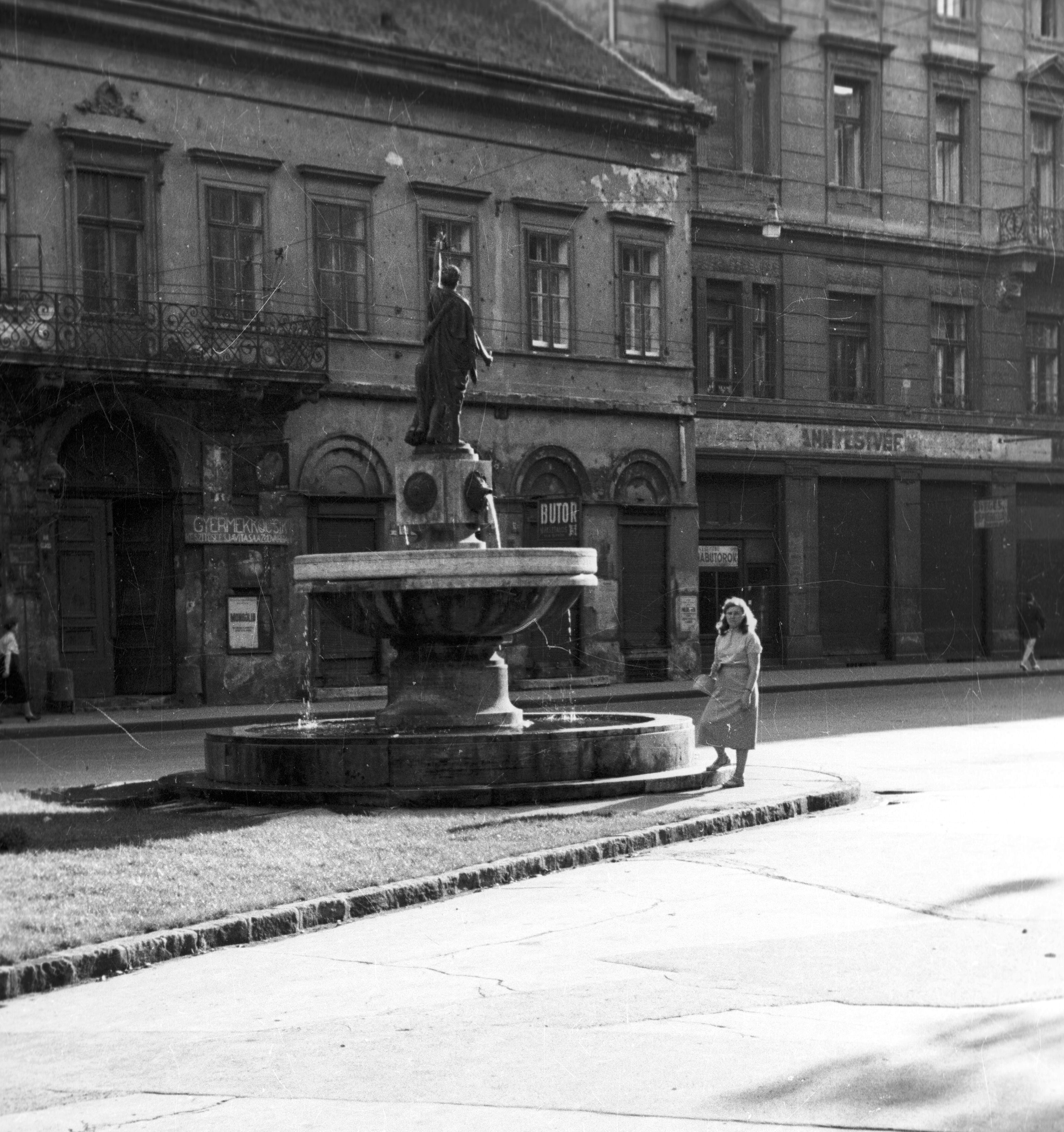 Szabó Ervin tér (Baross utca), Justitia-kút. Location: Hungary, Budapest VIII. Tags: monument, street view, upholsterer, Budapest Title: Szabó Ervin tér (Baross utca), Justitia-kút.